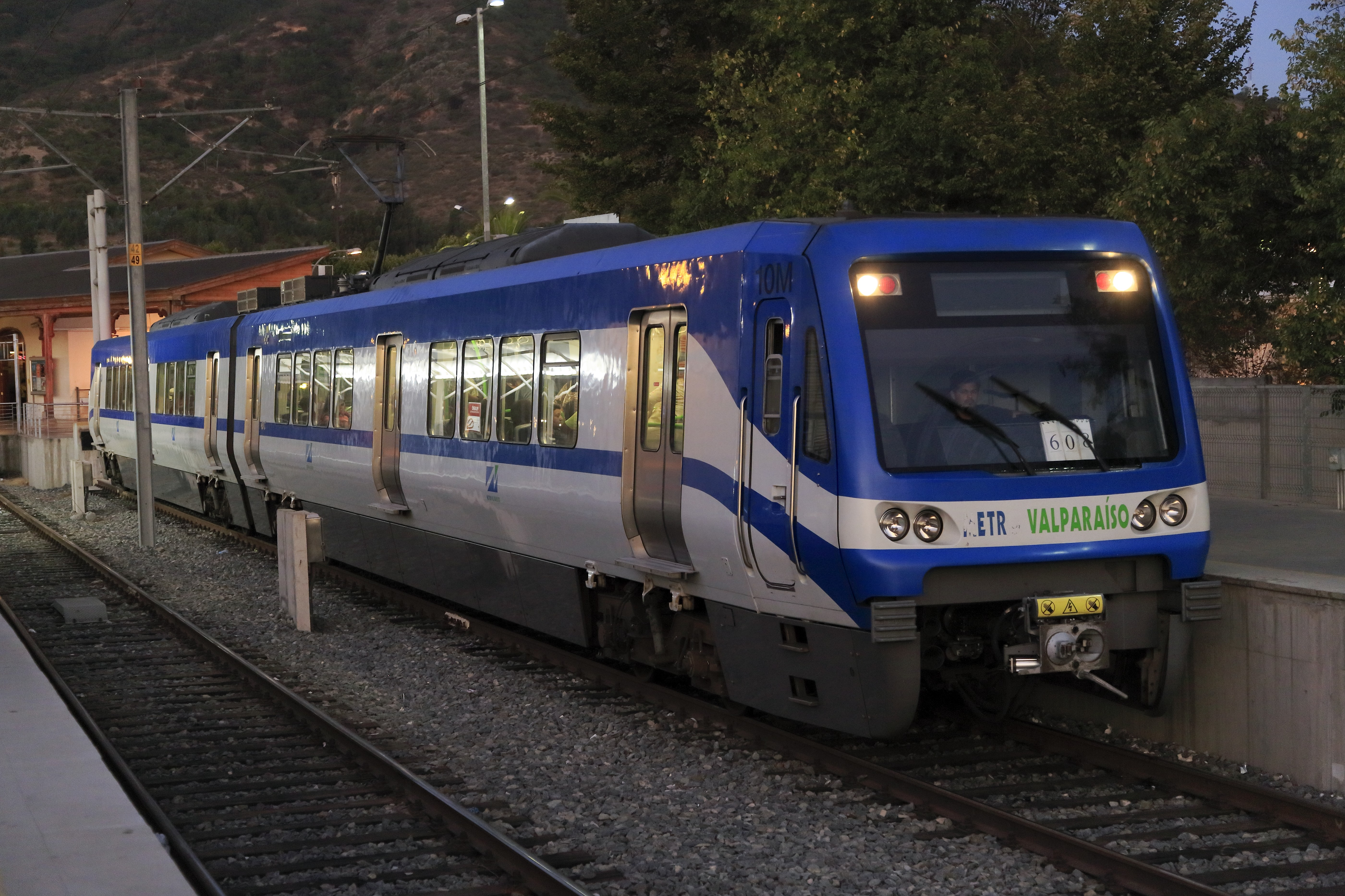 Triebwageneinheit 10 auf dem südlichen Stumpfgleis im Bf Limache. Sonntags verkehren die Züge nicht in Doppeltraktion.